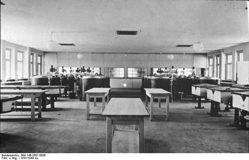 37 Küche